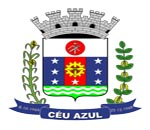 Brasao do municipio de Ceu Azul (Parana)